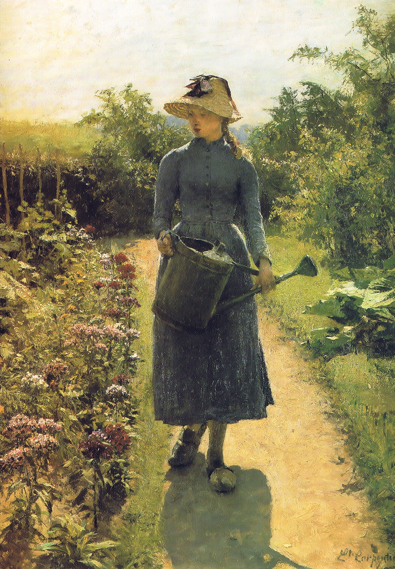 Jeune fille à l'arrosoir